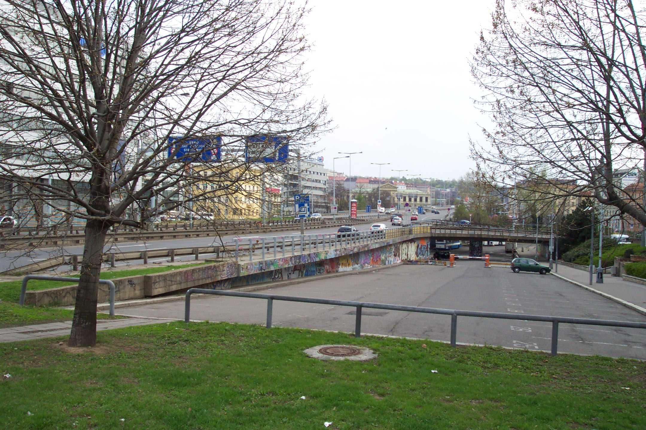 Severojižní magistrála, Těšnov